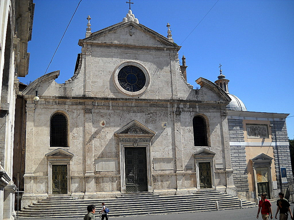 Roma Chjiesa di S Maria del Popolo